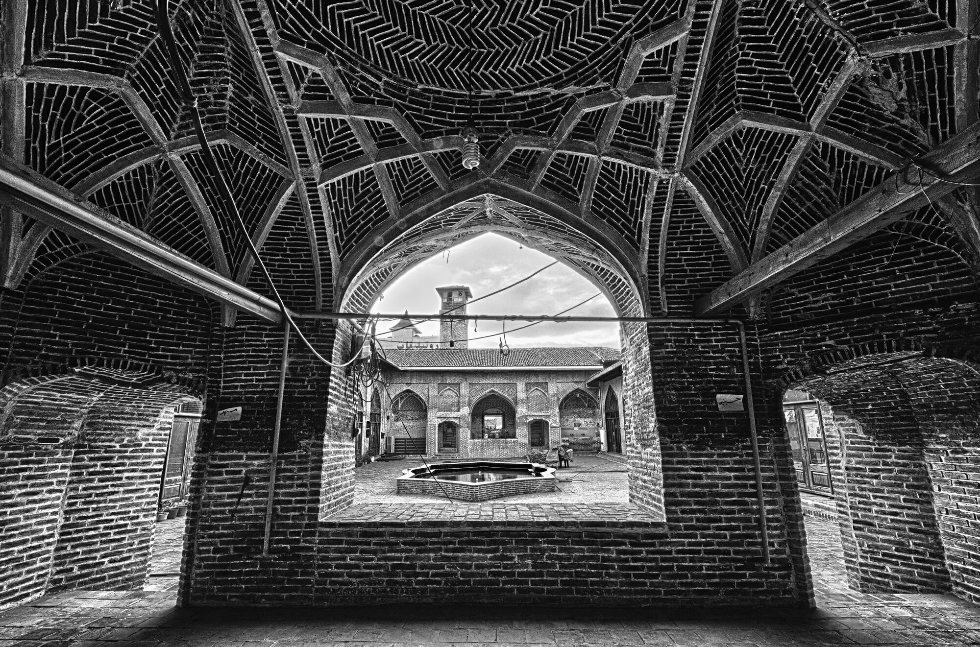 مسجد جامع بابل